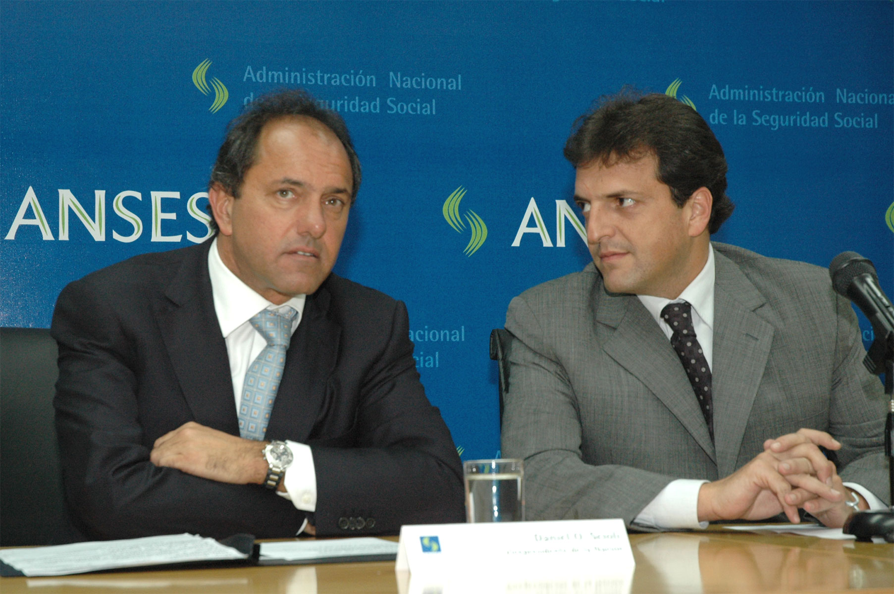 Daniel Scioli, Vicepresidente de la Argentina, junto a Sergio Massa, Director Ejecutivo de la ANSES, durante un anuncio.